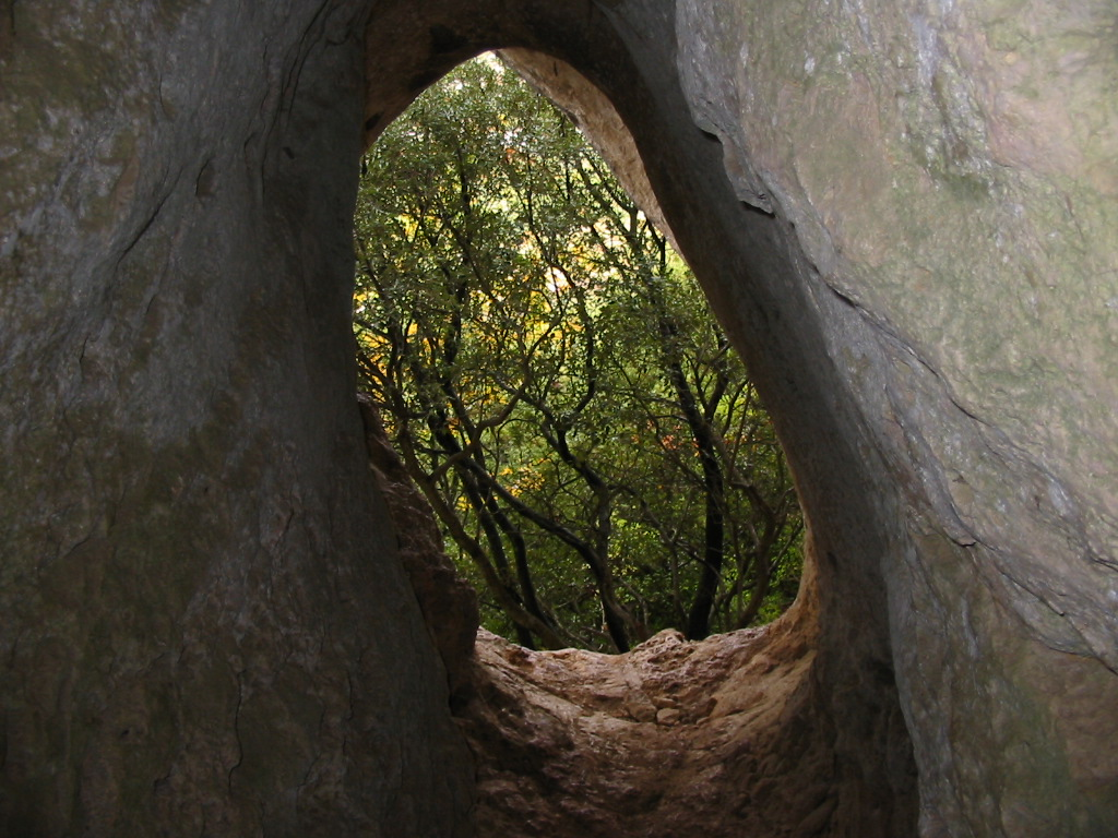 Grotte de Bérigoule